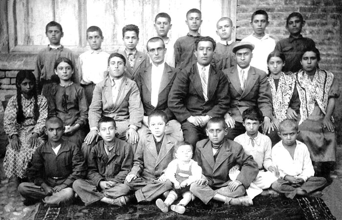 Коллектив учителей и учеников Средней школы Красной Слободы довоенных лет. Возможно фото 1932 -1938-ых годов, гор. Куба